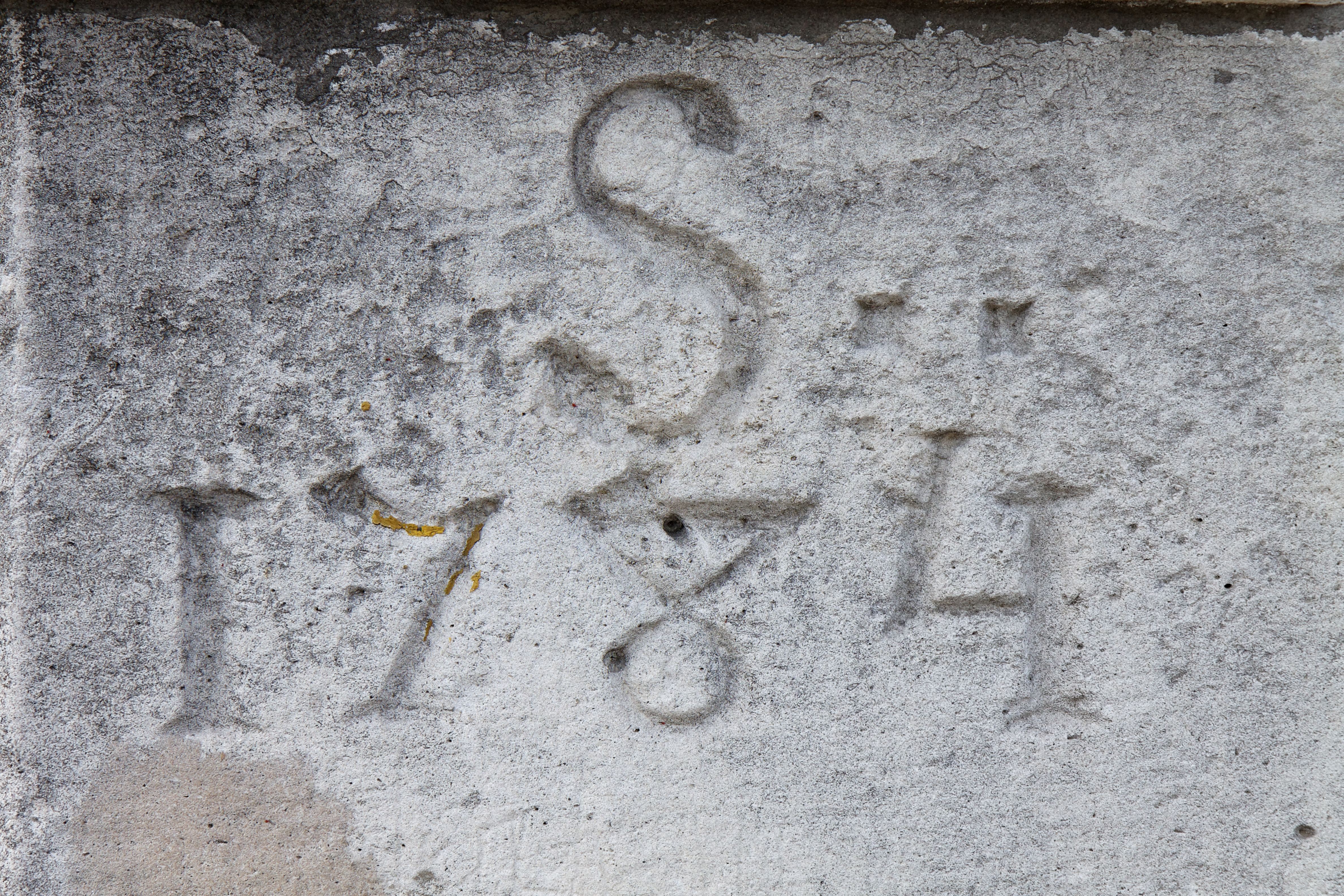 La pyramide du bois de Vincennes est érigée sur la route du même nom.